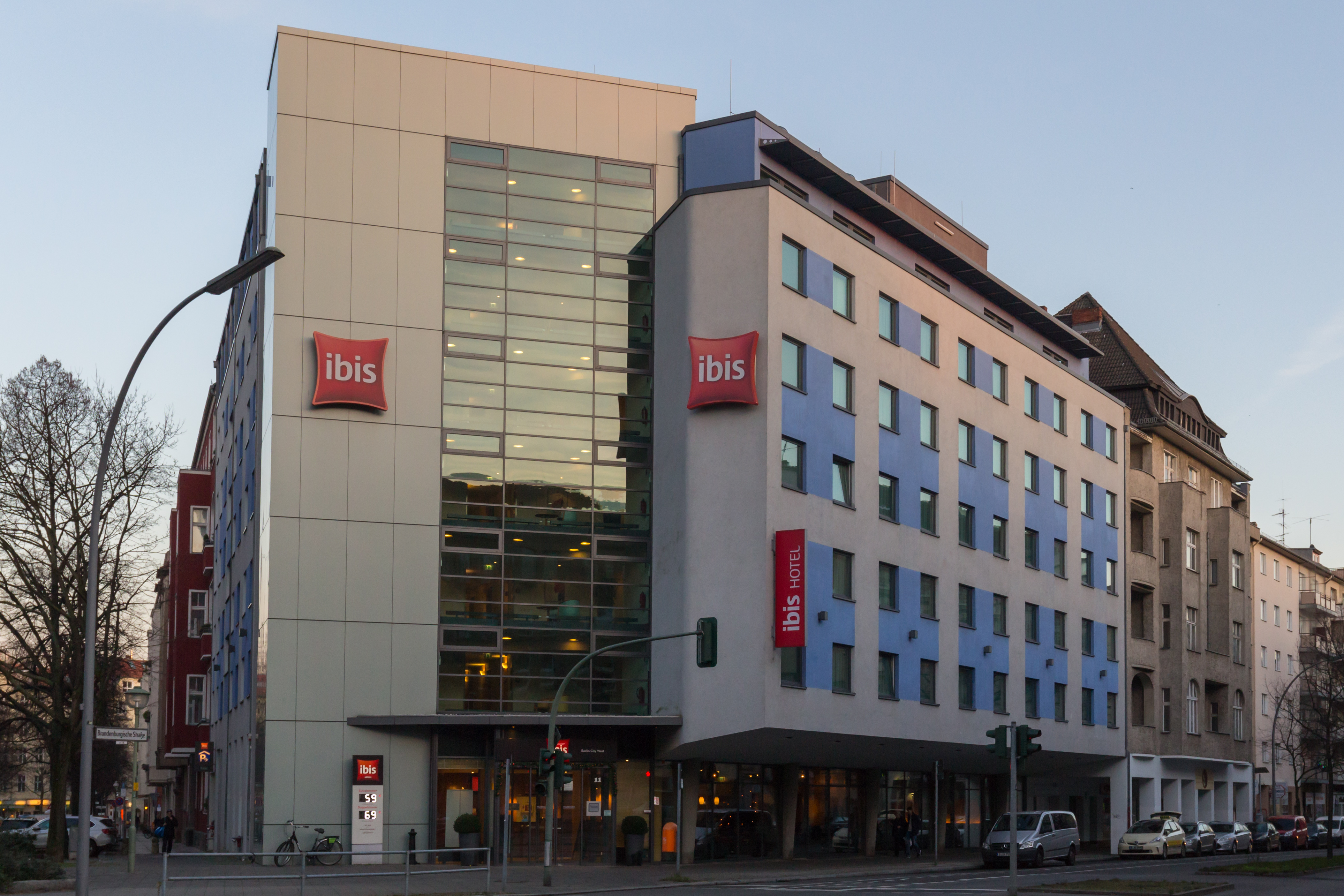 IBIS-Hotel in der Brandenburgischen Straße in Berlin-Wilmersdorf